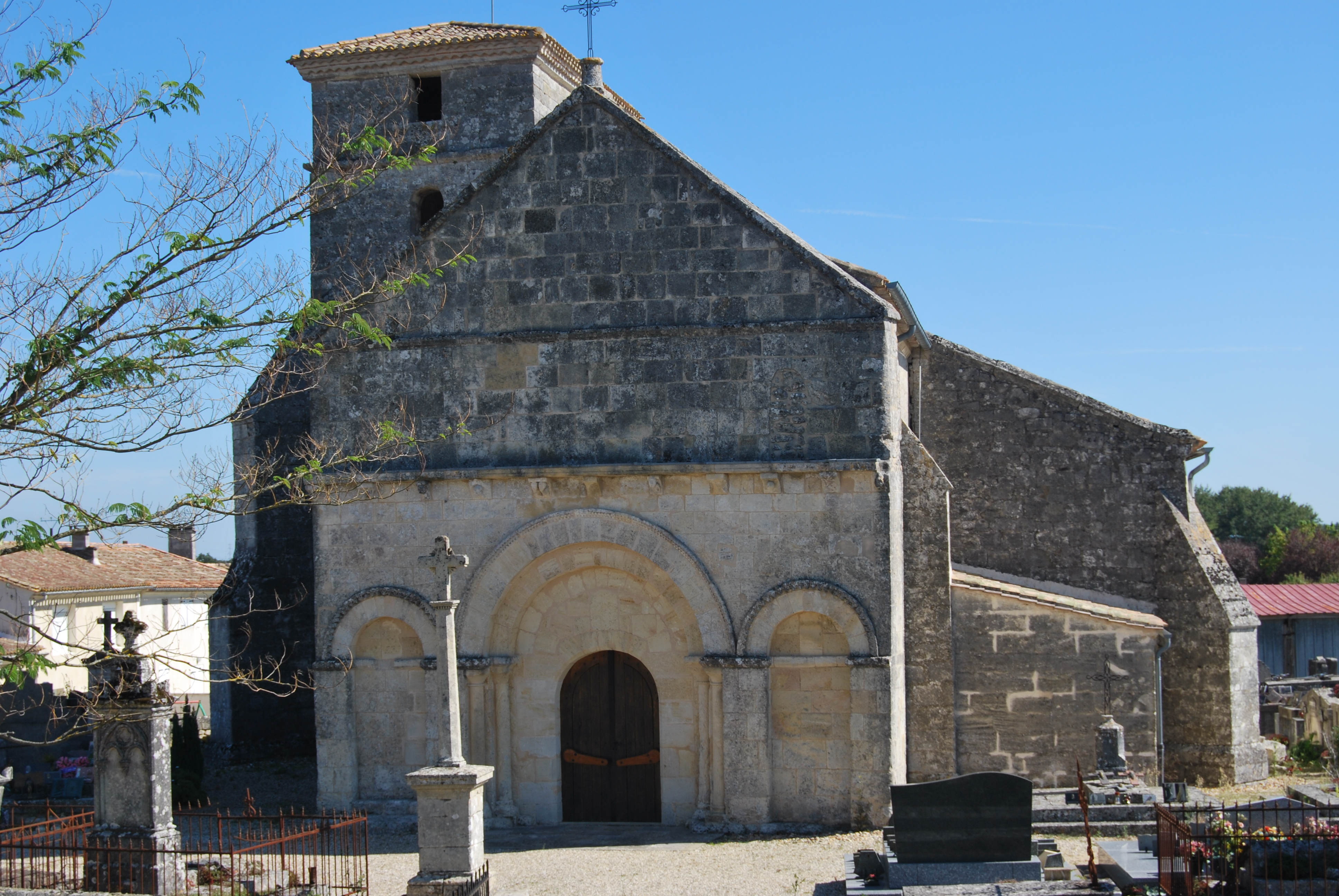 Église de Saint-Genès-de-Fronsac?UNIQ772a8ffb8bca9c80-ref-00000006-QINU? .